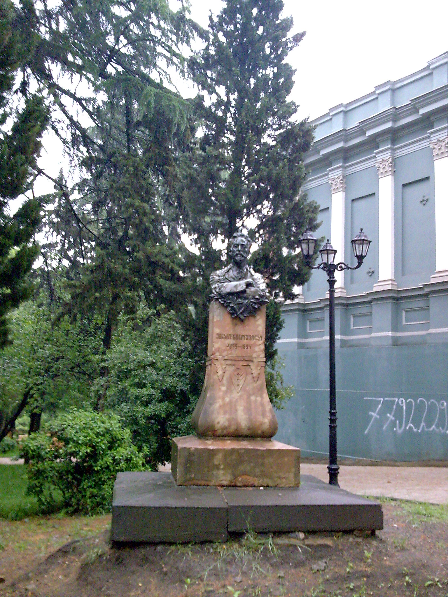 Egnate Ninoshvili (Georgian writer) statue in Rustaveli Avenue, Tbilisi.